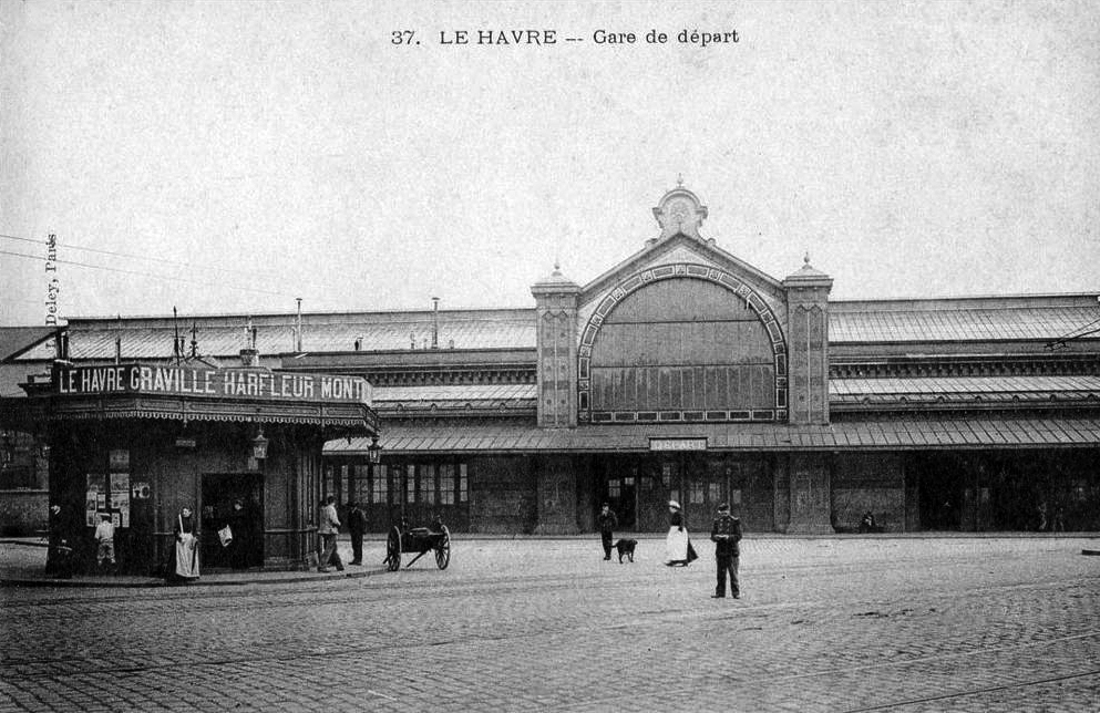 La gare de départ du Havre réalisée par l'architecte Juste Lisch en 1882.